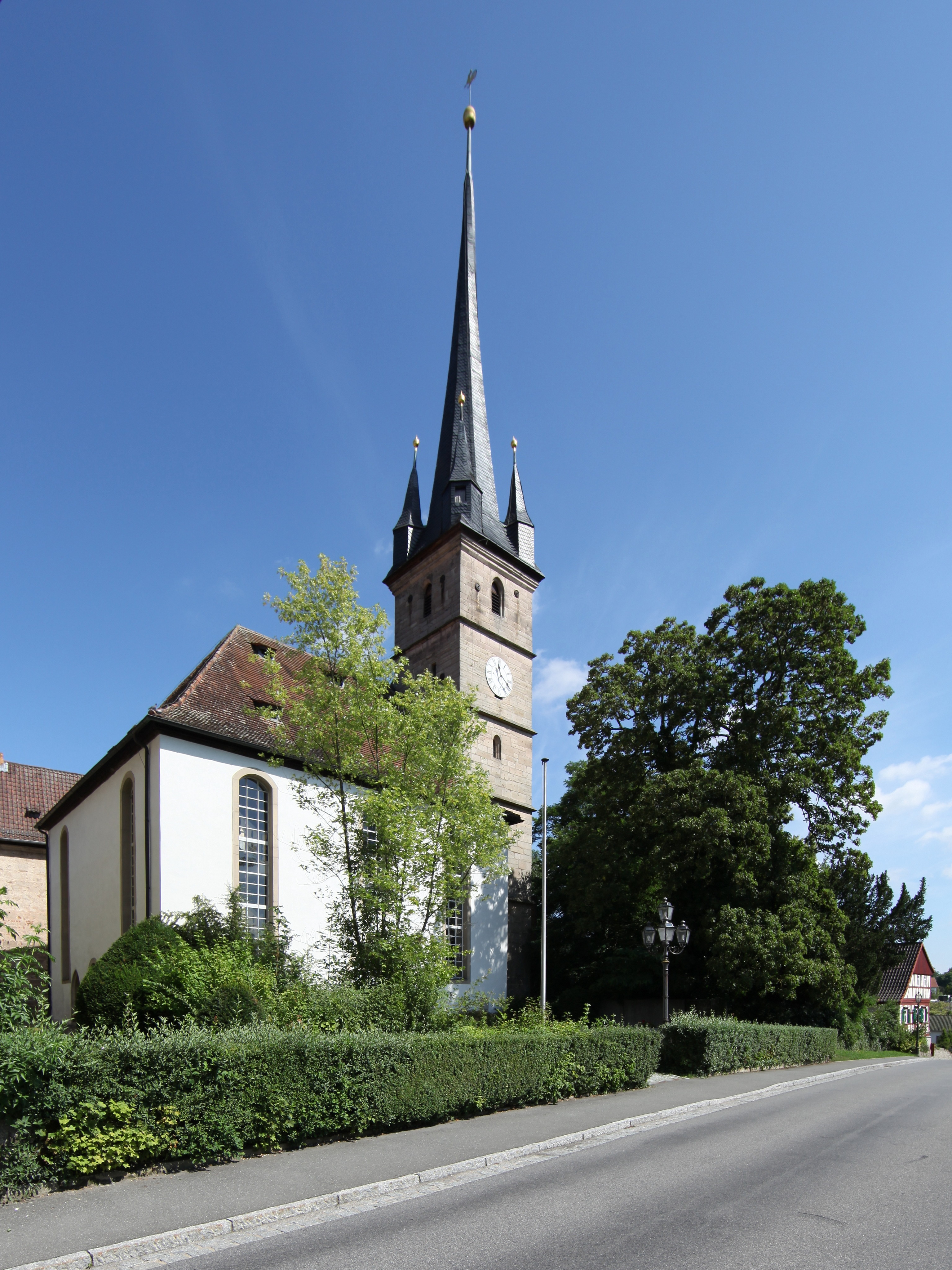 Schlosskirche in Ahorn